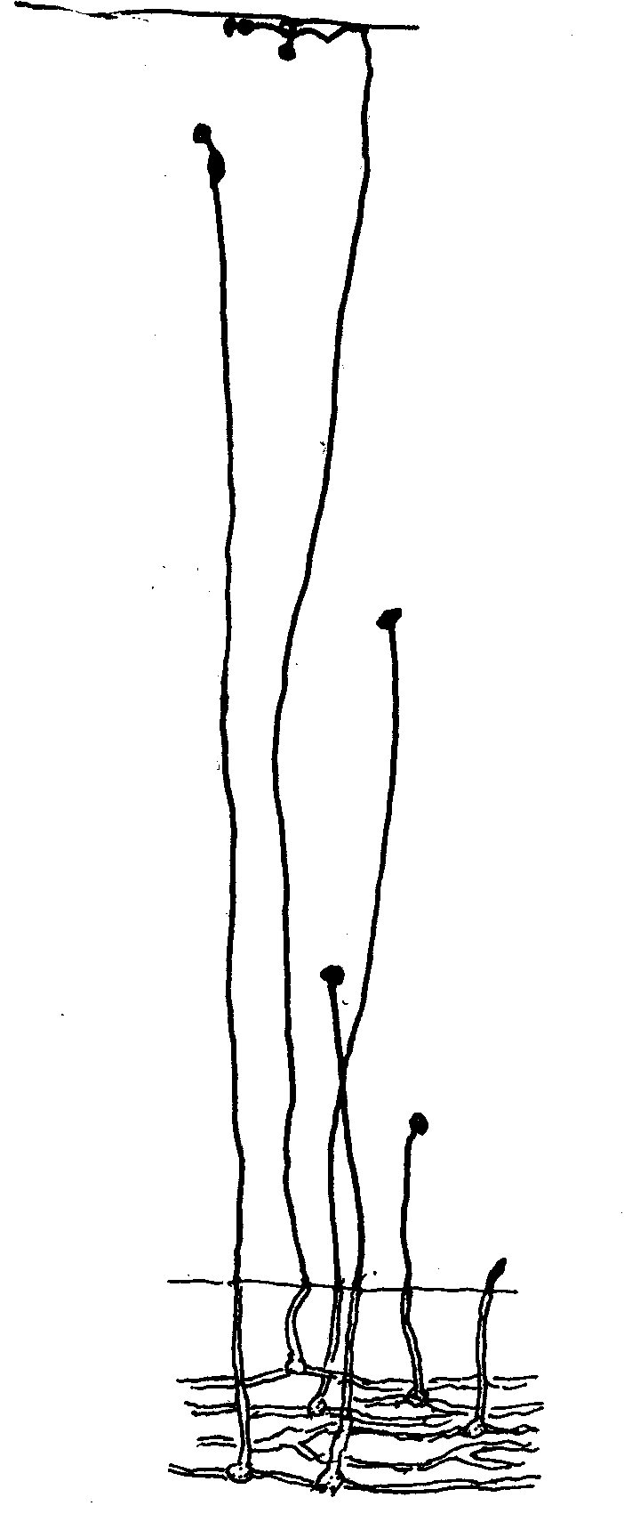 Kirk & Benjamin(1980) Trans. Brit. mycol. Soc. 75:p.123-131.より模写